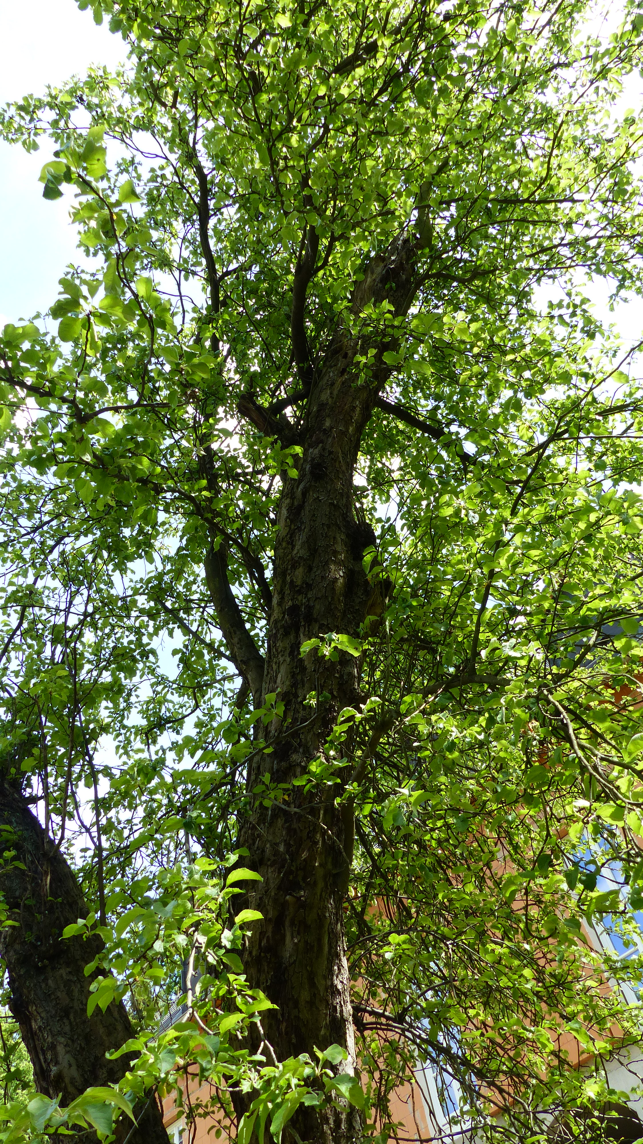 Naturdenkmal Apfelbaum "Schafsnase", Grundstraße 146, Bühlau, Dresden